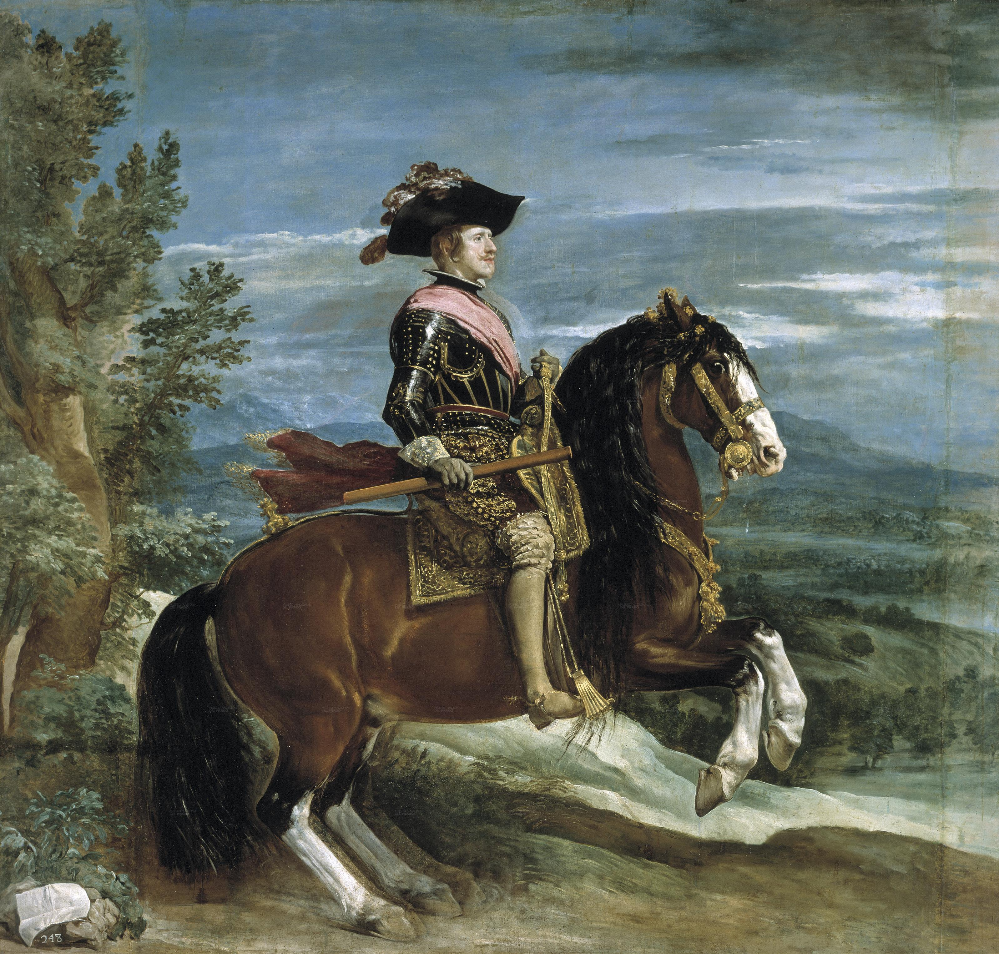 Retrato ecuestre del rey Felipe IV de España (1601-1665), que fue hijo del rey Felipe III de España y de la reina Margarita de Austria.